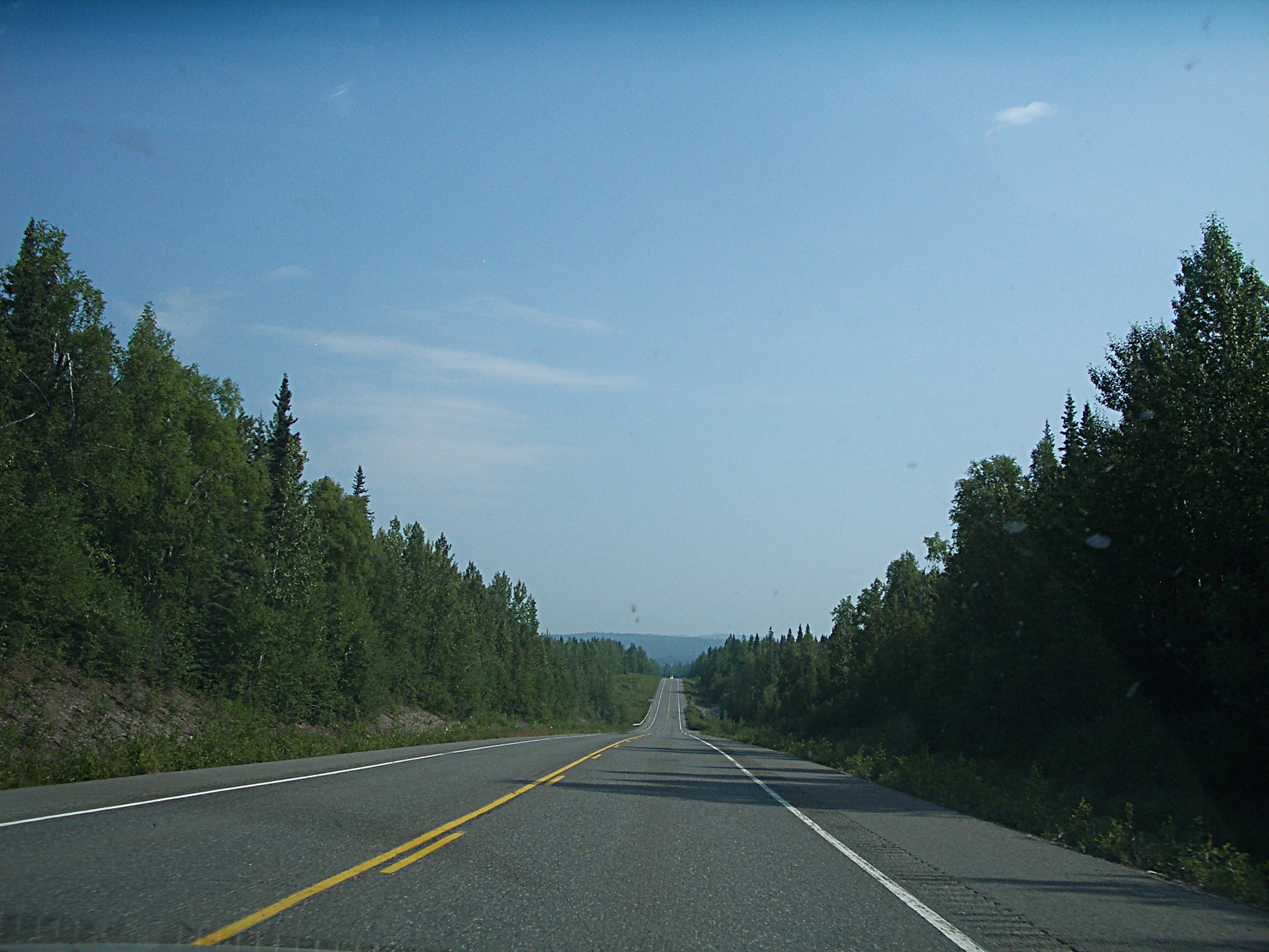 George park Highway en allant vers Denali National Park (Alaska)